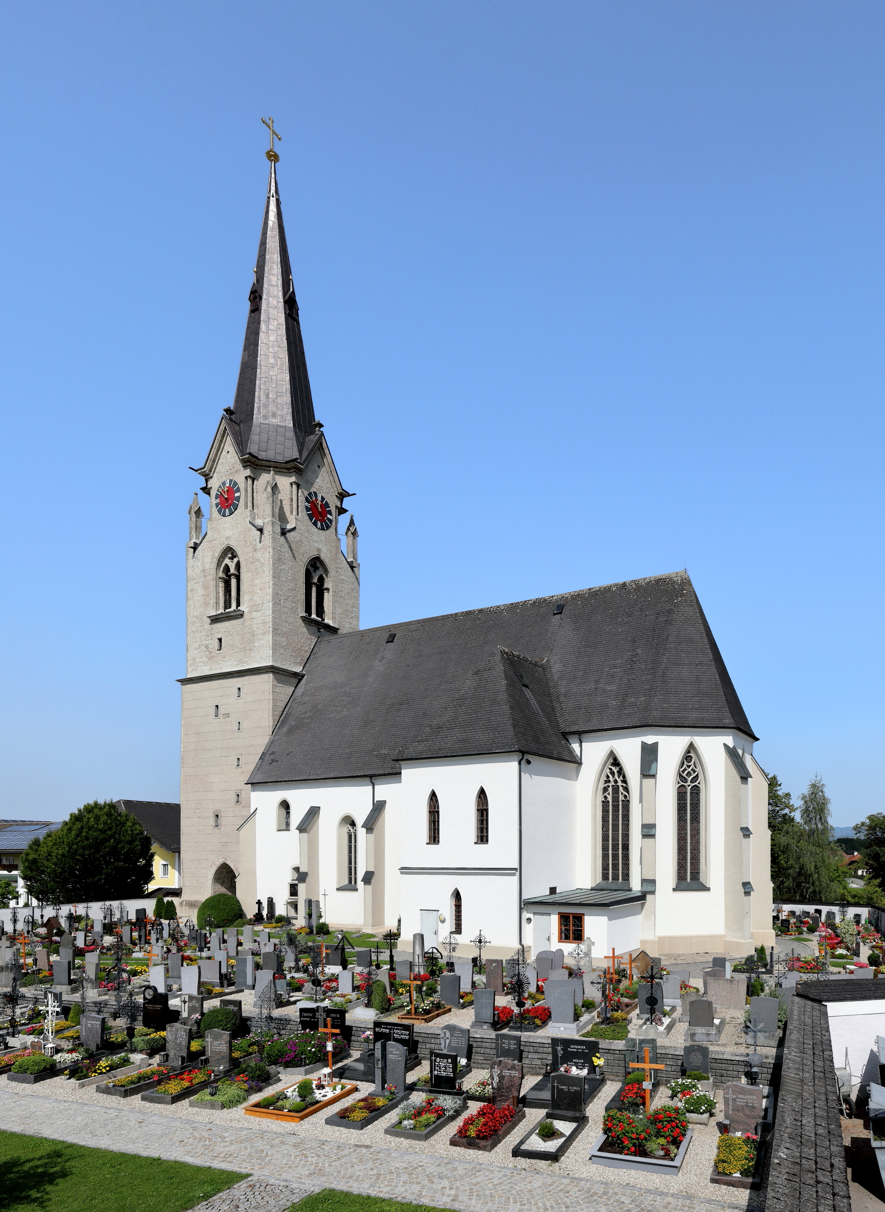 Südostansicht der röm.-kath. Pfarrkirche hl. Remigius in der oberösterreichischen Gemeinde Gampern. Die zweischiffige spätgotische Hallenkirche wurde von 1480 bis 1486 gebaut. Anfang des 16. Jahrhunderts erfolgte die Errichtung des mächtigen gotischen Westturmes bis zur Dachgleiche und 1890 der Ausbau auf eine Höhe von 63 m.